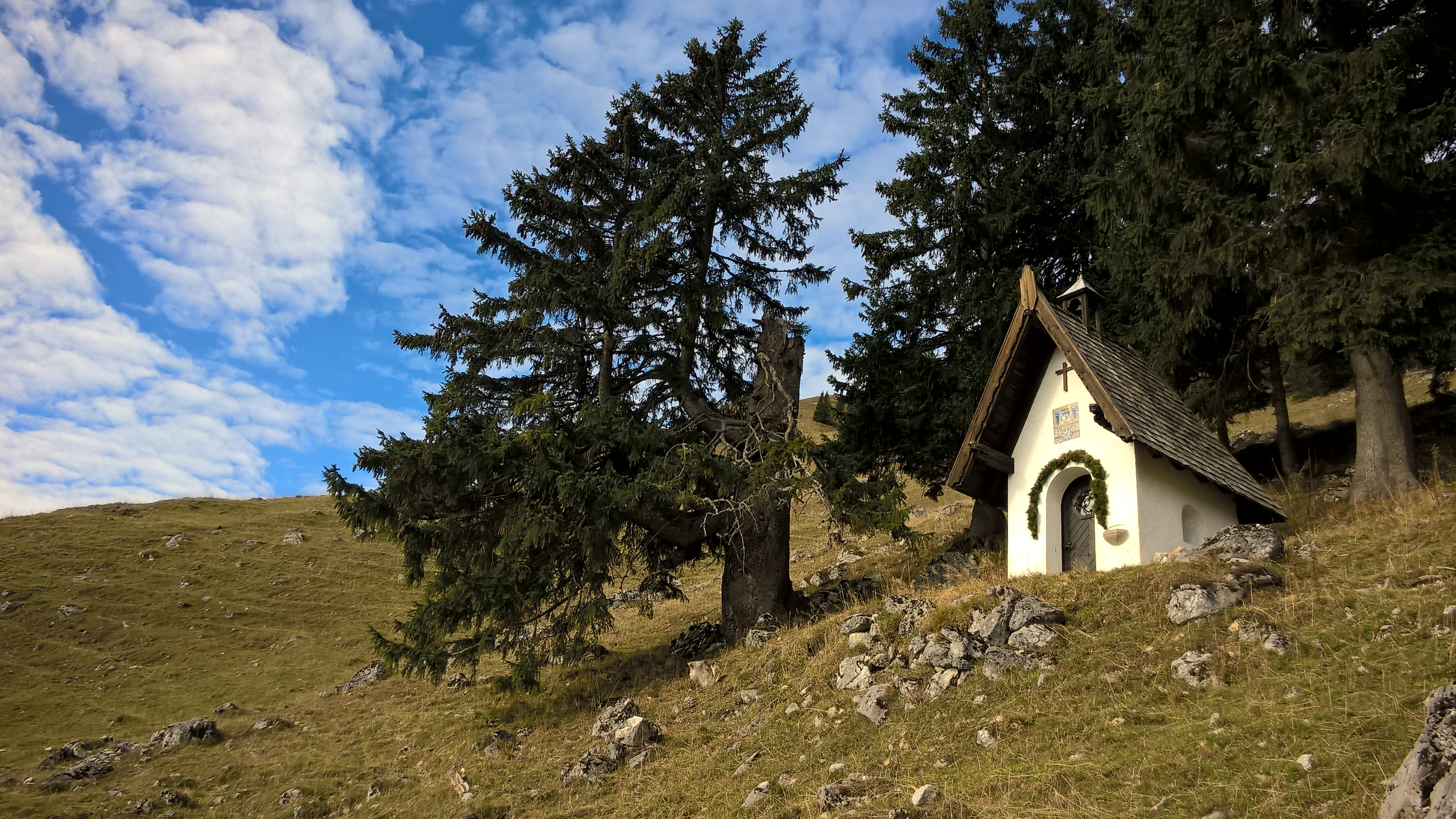 Neuhüttenalm Kapelle in Bad Wiessee, kleiner schindelgedeckter steiler Satteldachbau, 1922; zum Gedenken an die im Ersten Weltkrieg gefallenen Mitglieder des Clubs alpiner Skiläufer, auf der Neuhüttenalm This is a photograph of an architectural monument.